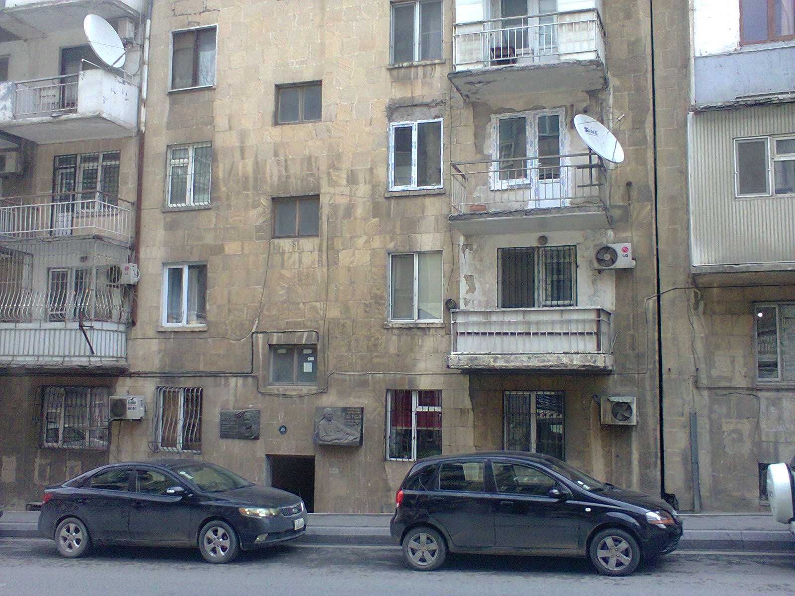 Дом где жили Али Туде и Мамед Джафар